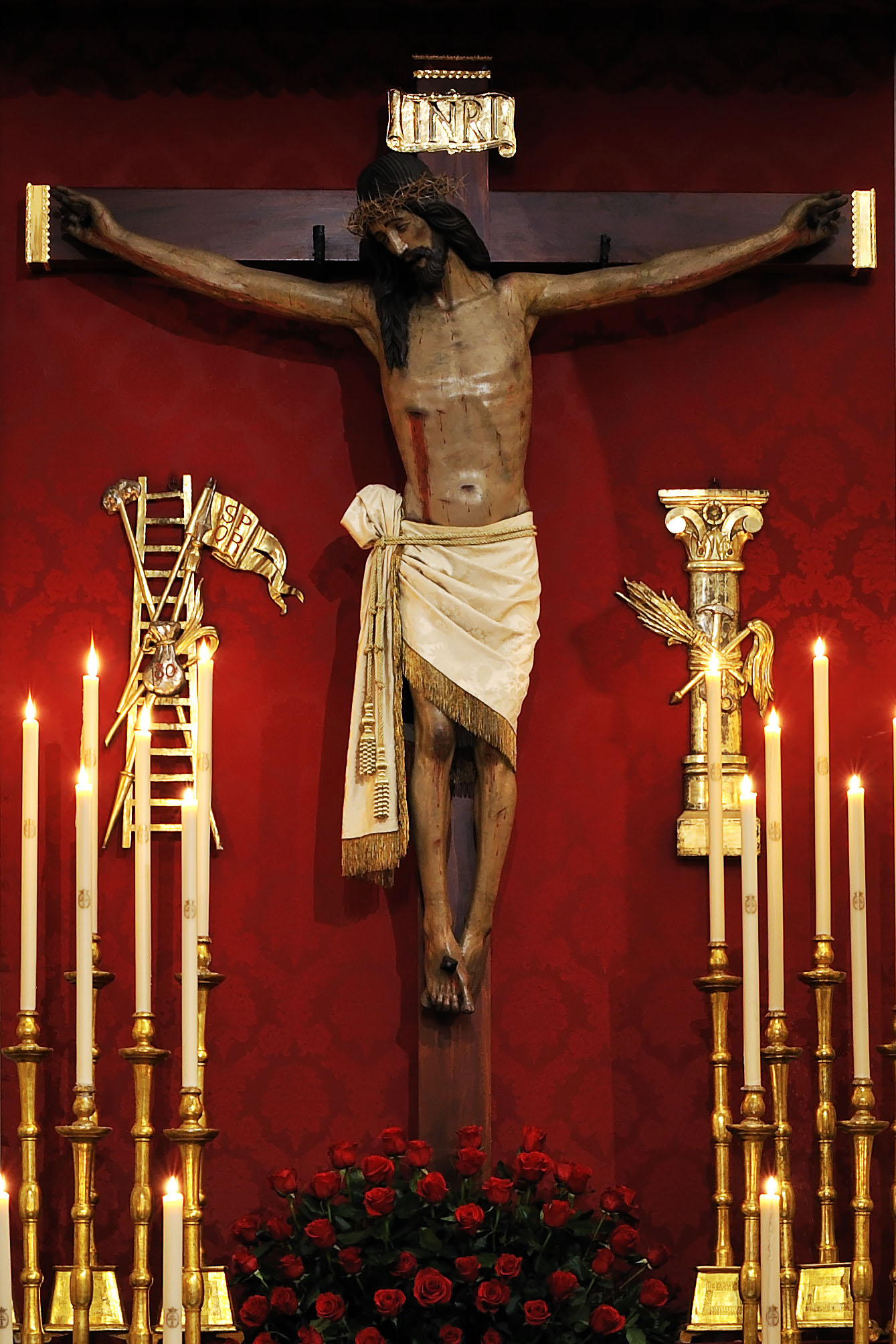 Triduo del Stmo. Cristo de La Salud.